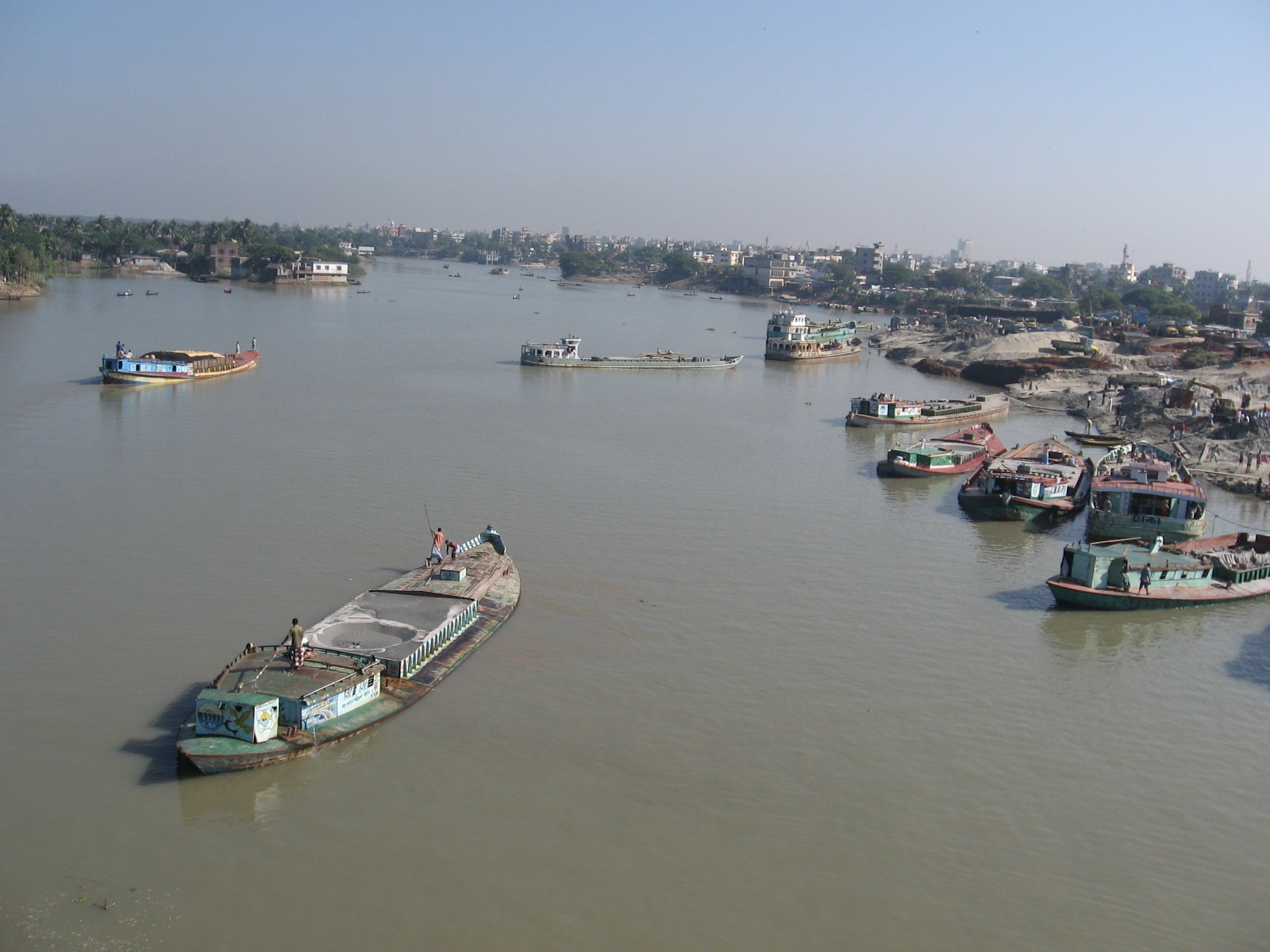 Bangshi River near Savar, Bangladesh